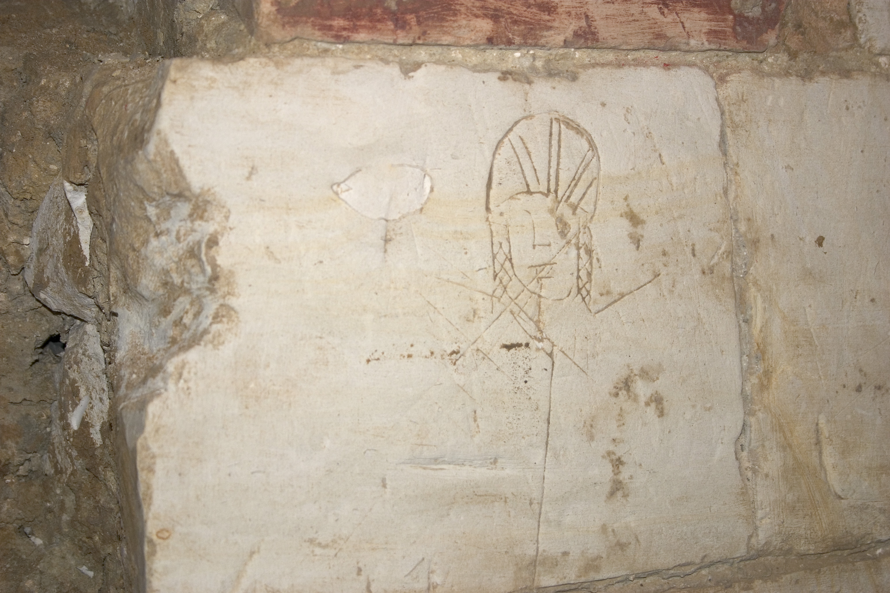 Bapaume pierre gravée dans le bastion du Dauphin